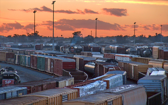 Boxcars